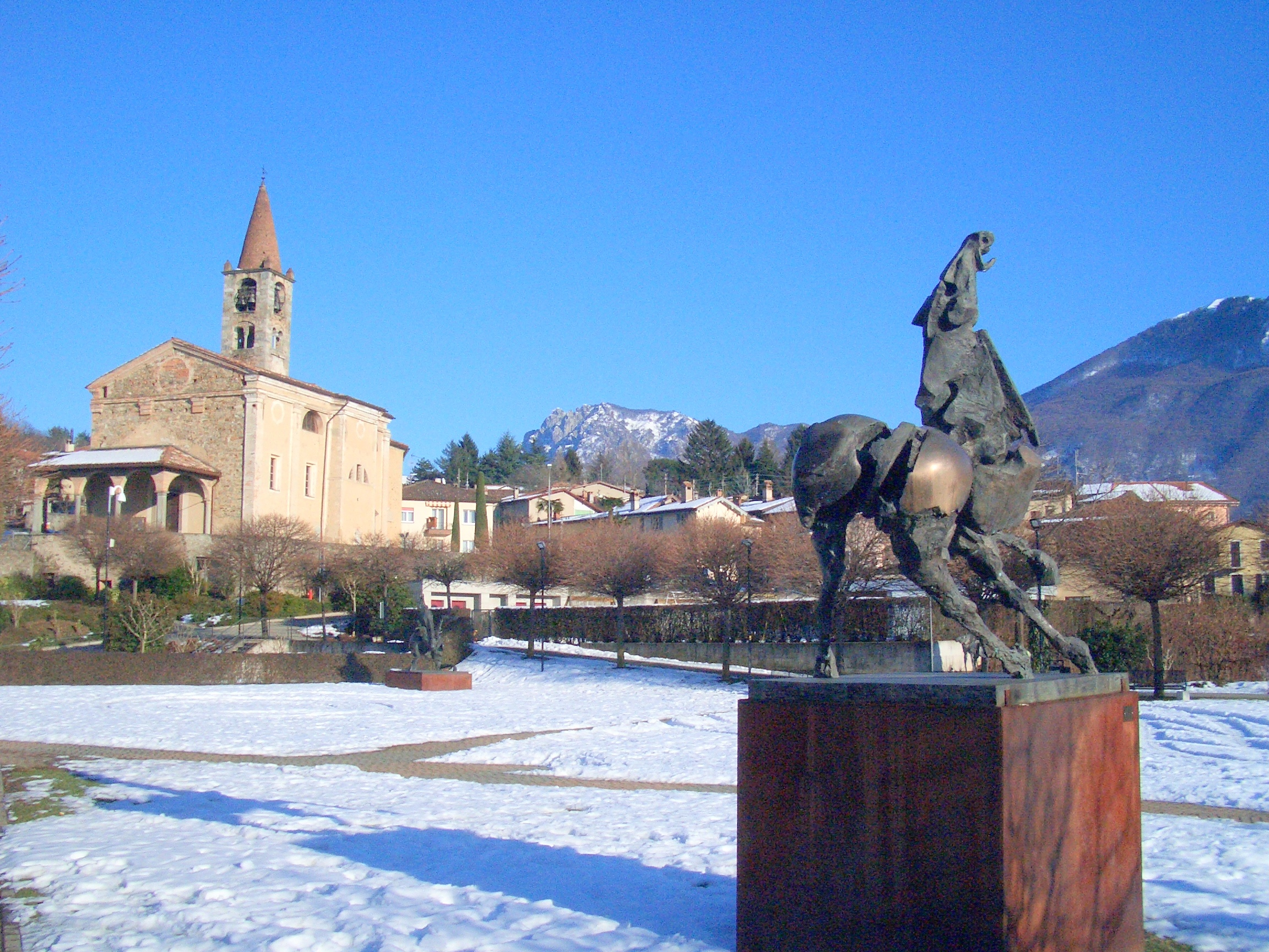 scena invernale